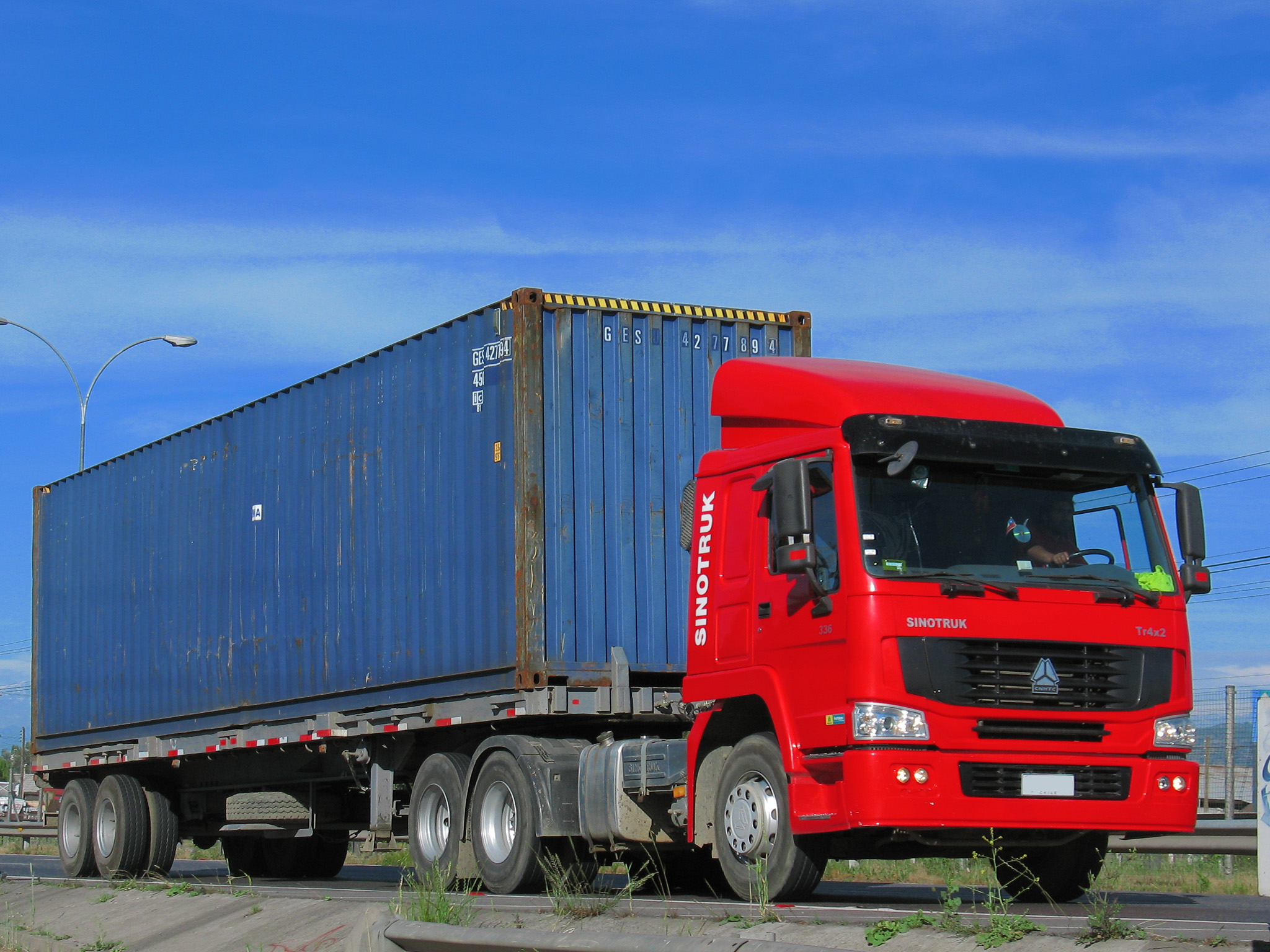 Sinotruk Tr4x2 336 2010